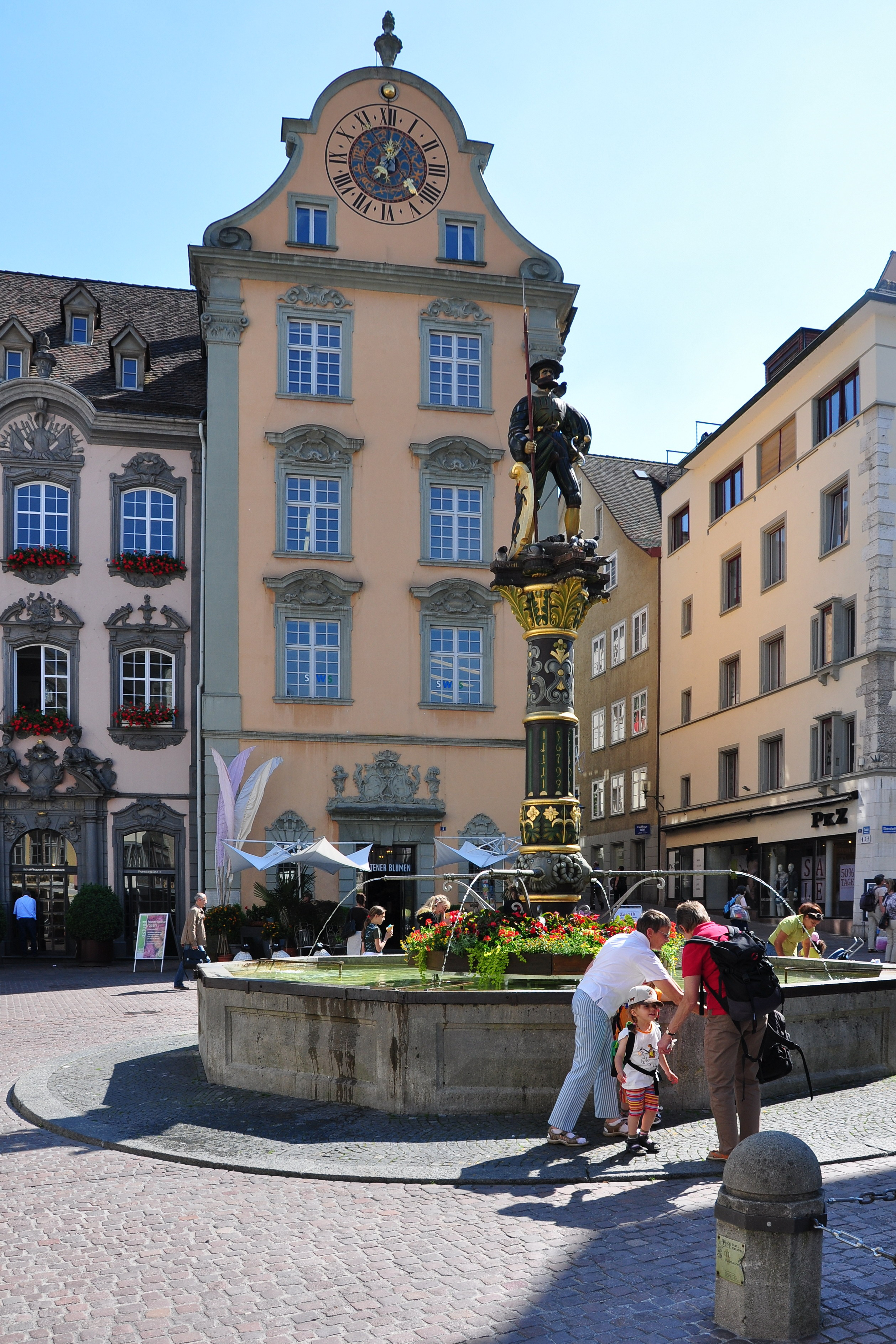 Fronwagplatz in Schaffhausen (Switzerland)